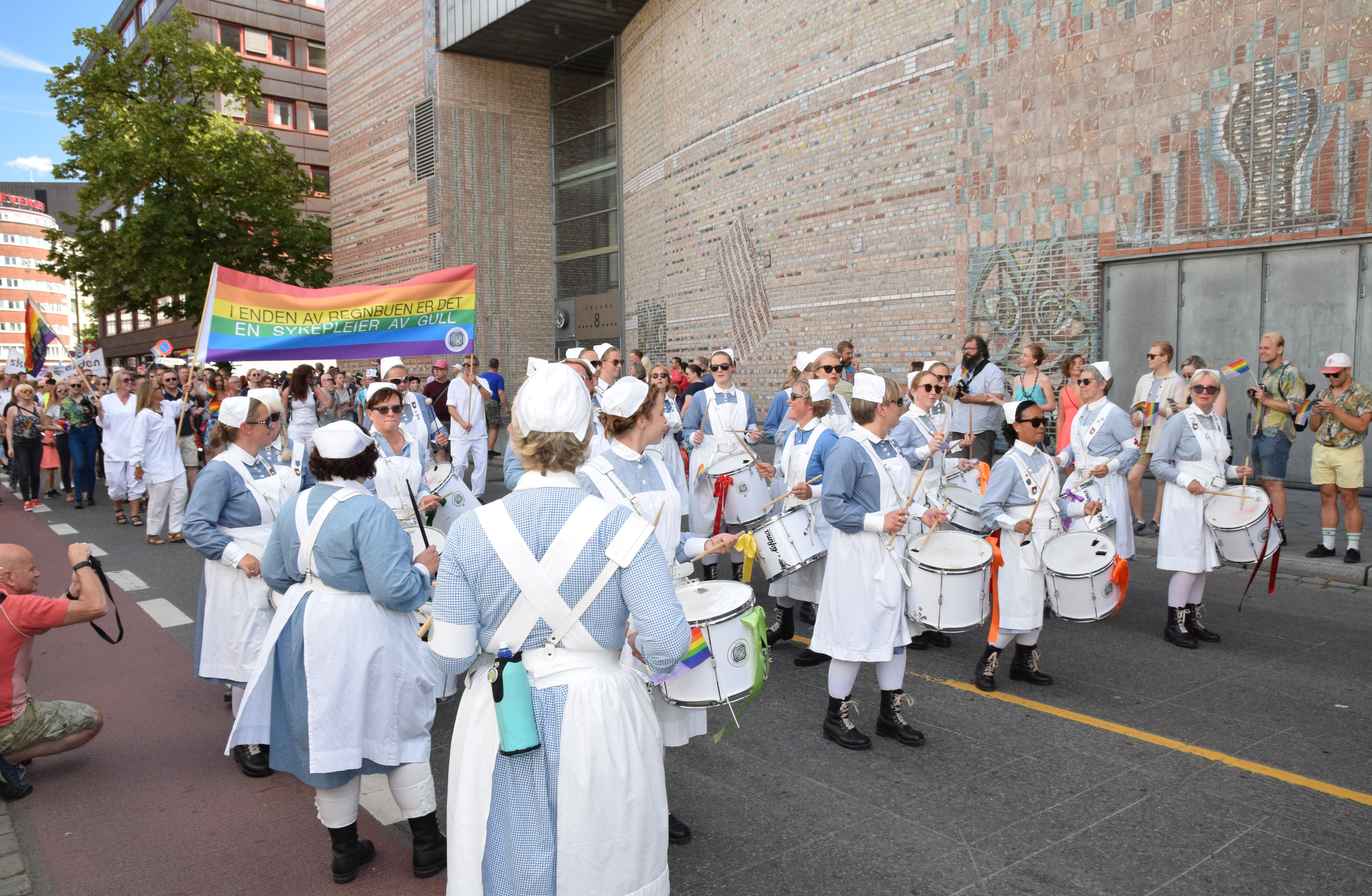 Sykepleiere i Oslo pride 2016, ved Oslo Spektrum